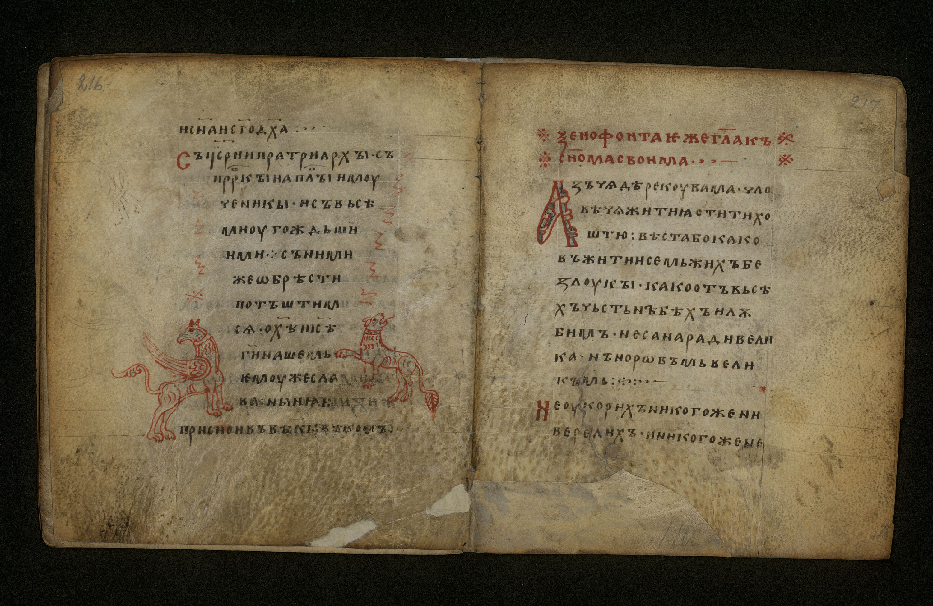 Одна из первых древнерусских рукописных книг